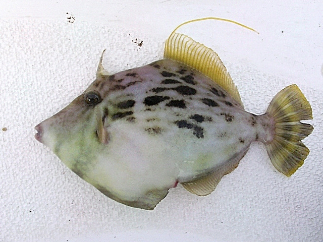 カワハギ(神奈川県相模湾) Stephanolepis cirrhifer (Sagami Bay, Kanagawa, JAPAN)